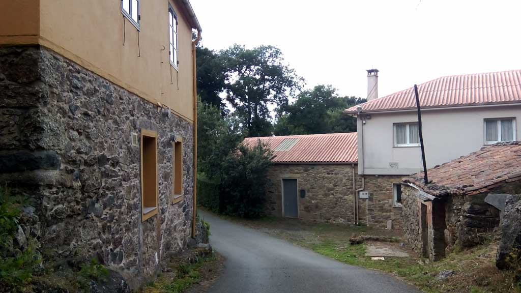 Casas nos Modillós de Arriba, Curtis.